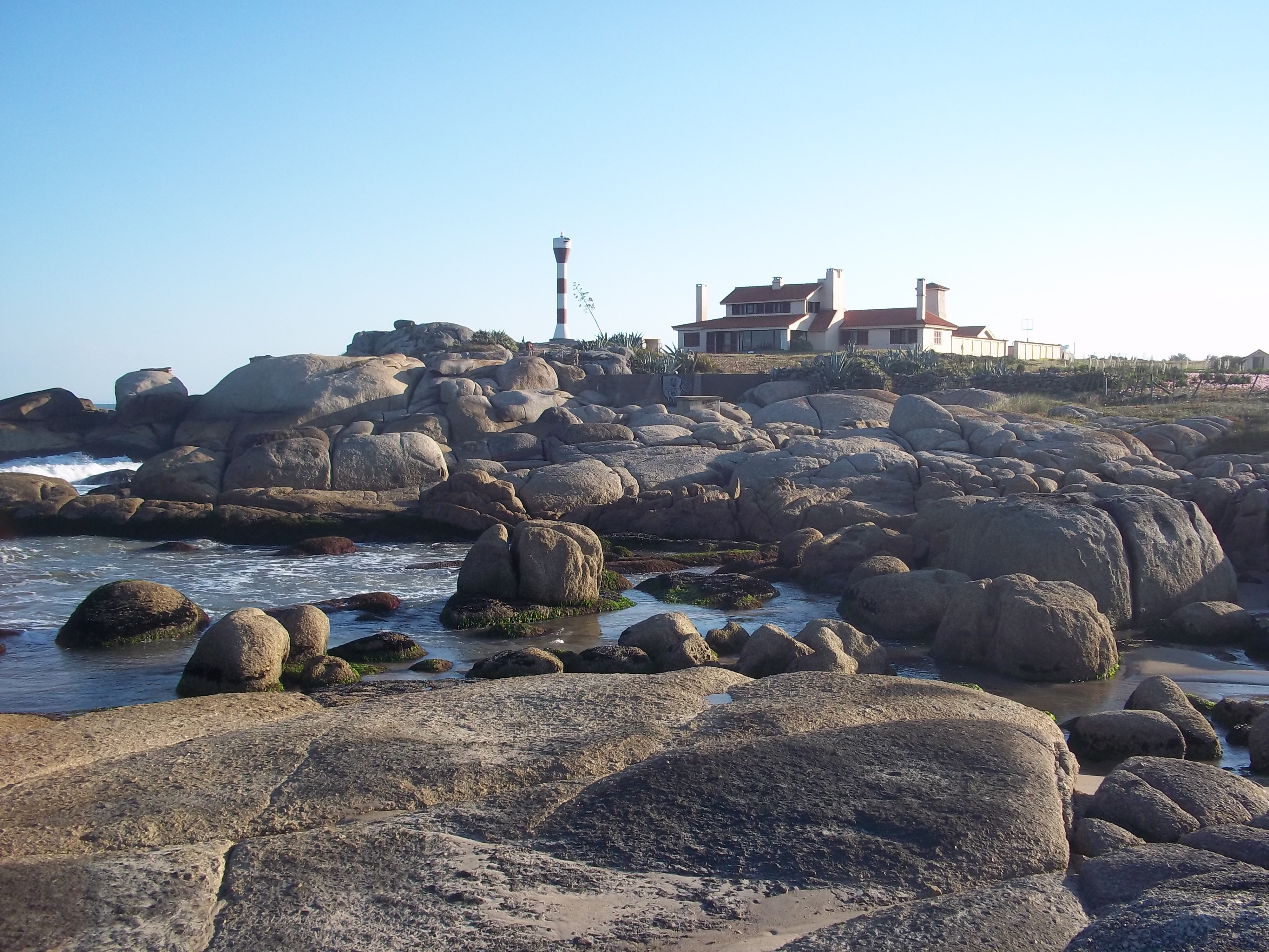 Faro y Casa de la Viuda en Punta Palmar (Punta del Diablo, Rocha)